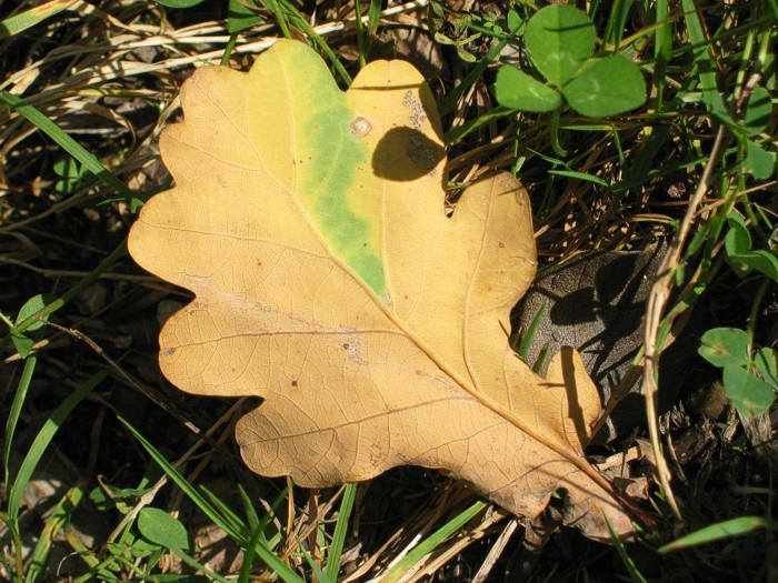 Mine von Ectoedemia subbimaculella